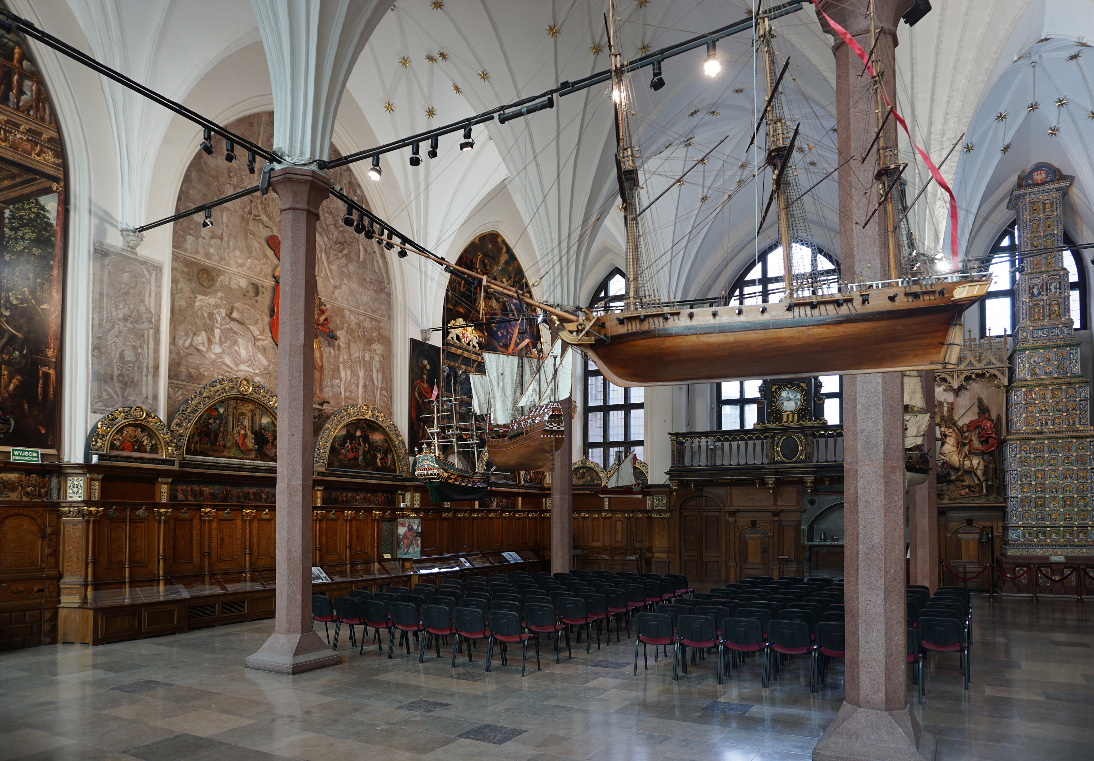 Dwór Artusa, wnętrze wielkiej hali